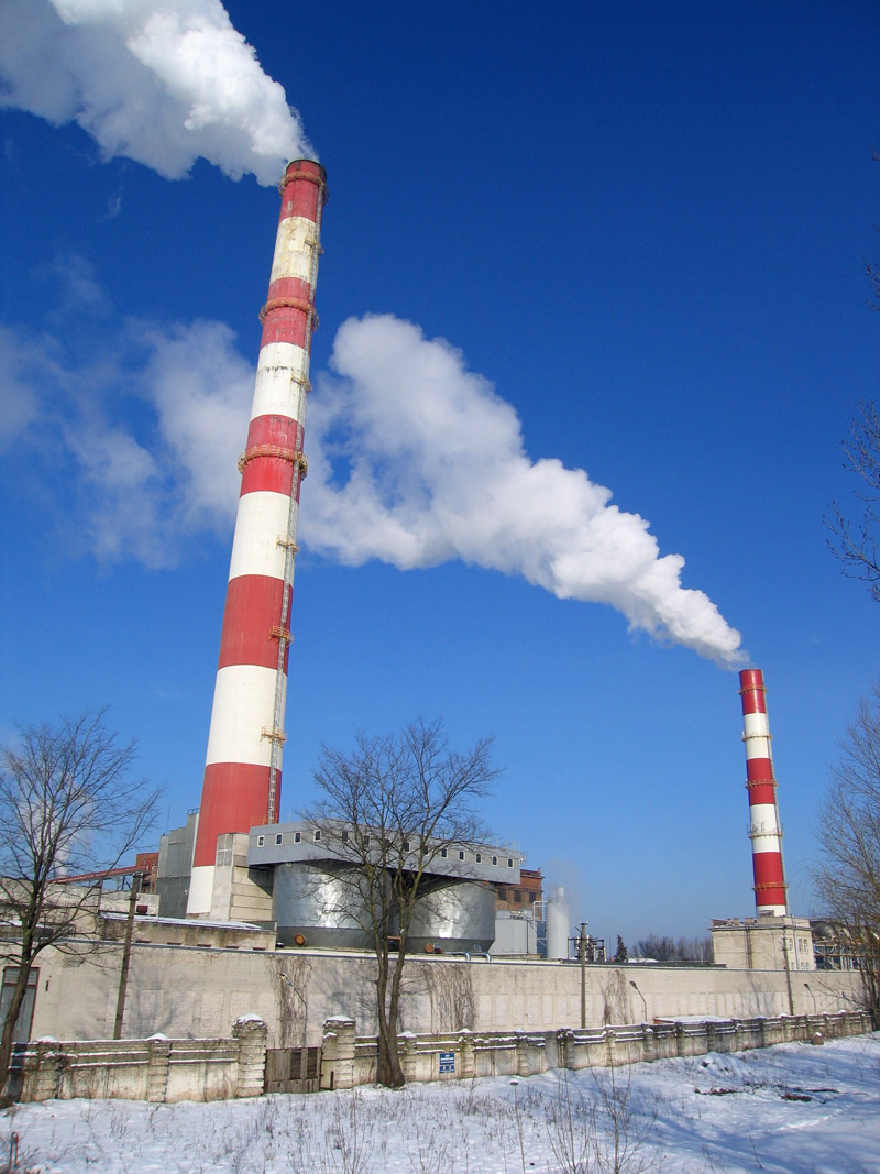 Vilnius Power station (Savanoriu str.)